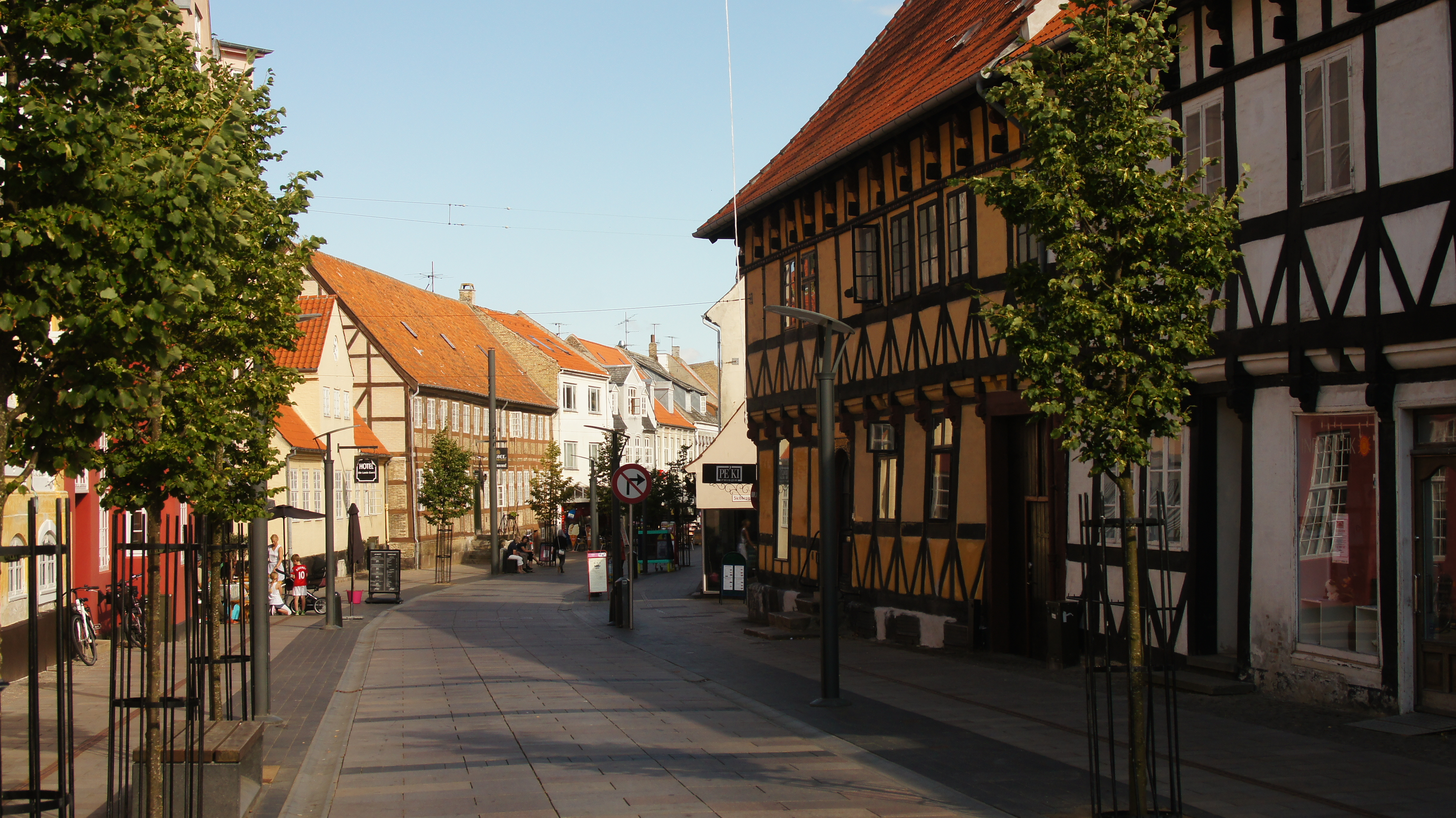 Kordilgade